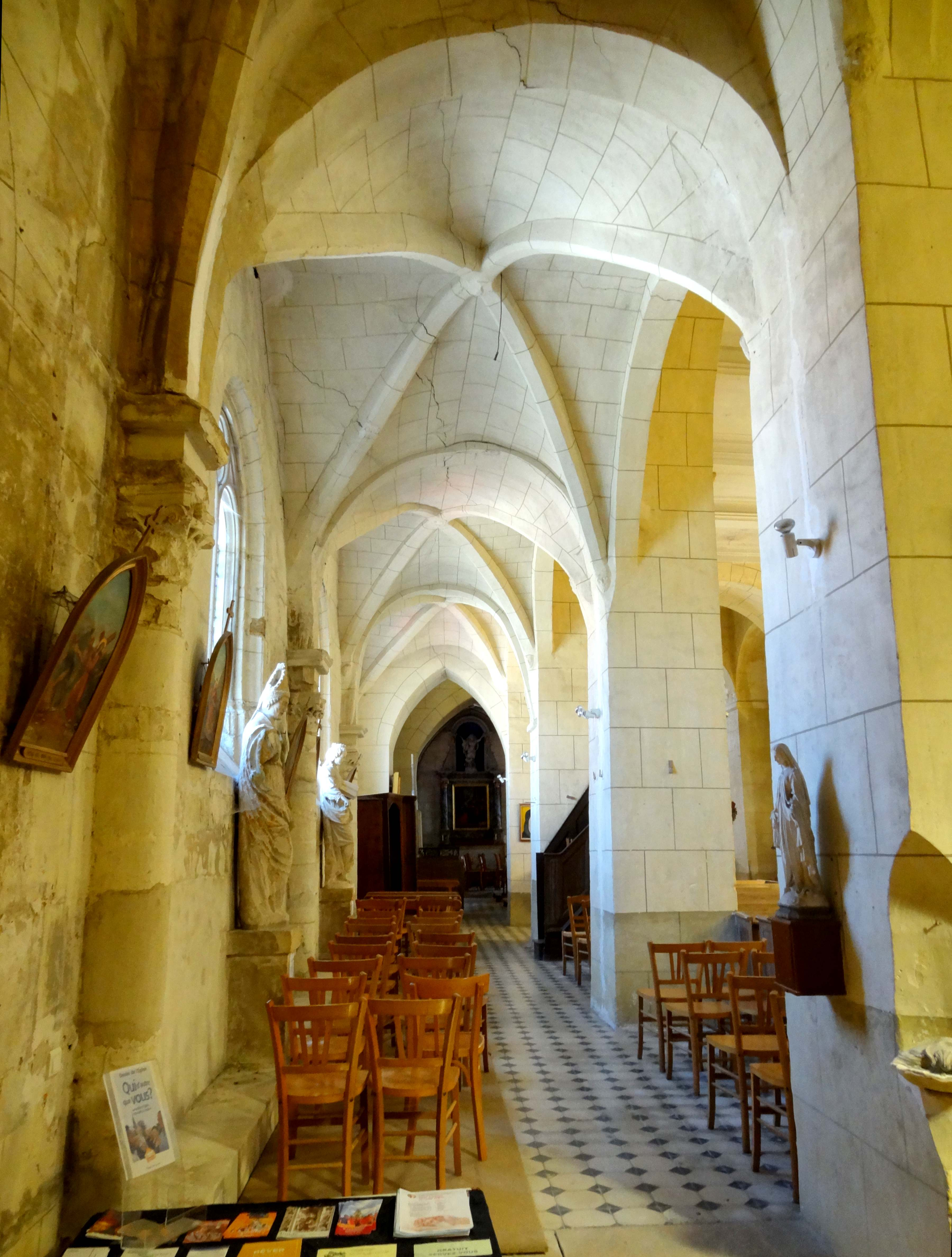 Intérieur de l'église - voir titre.